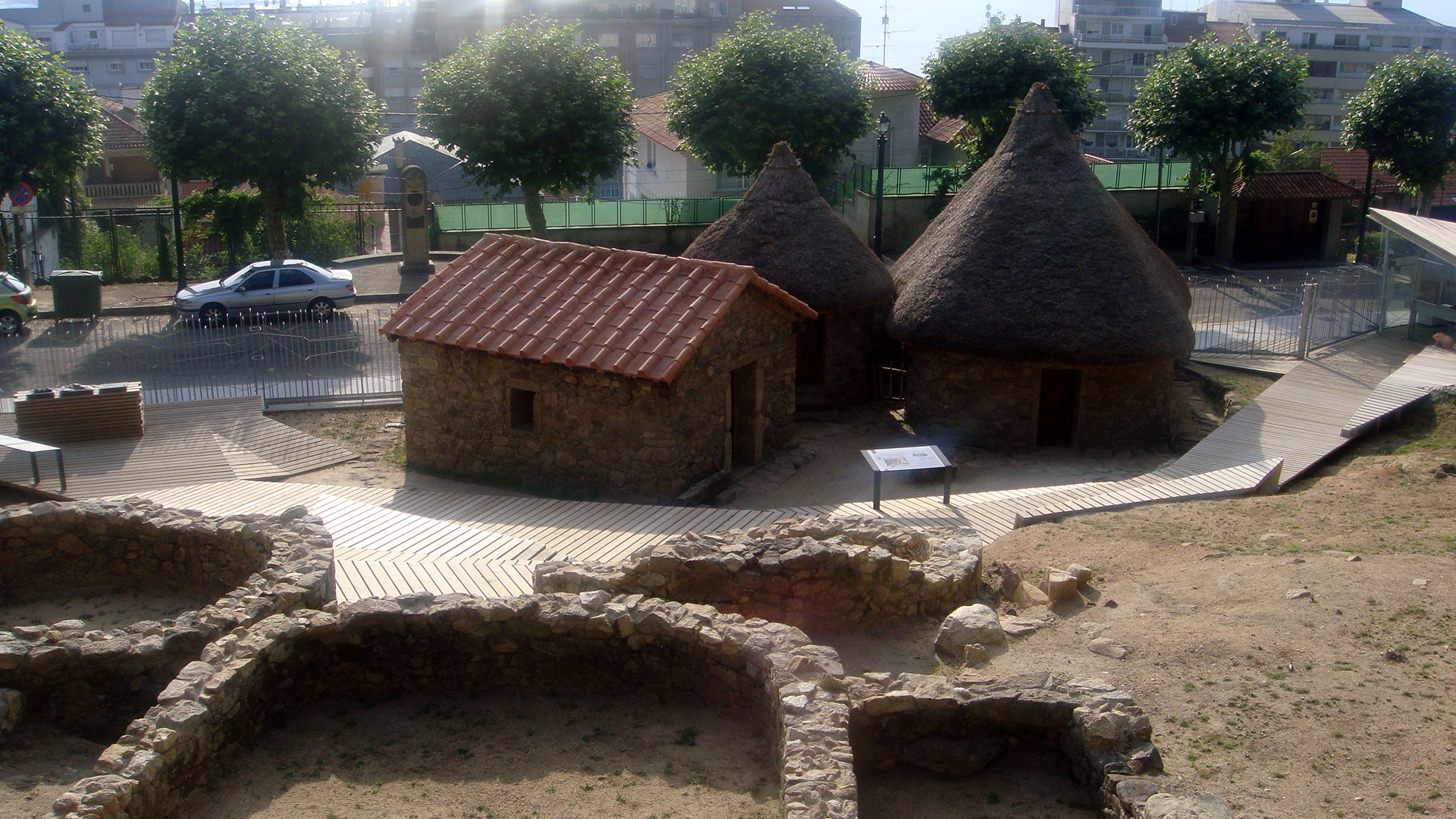 Vigo poblado celta